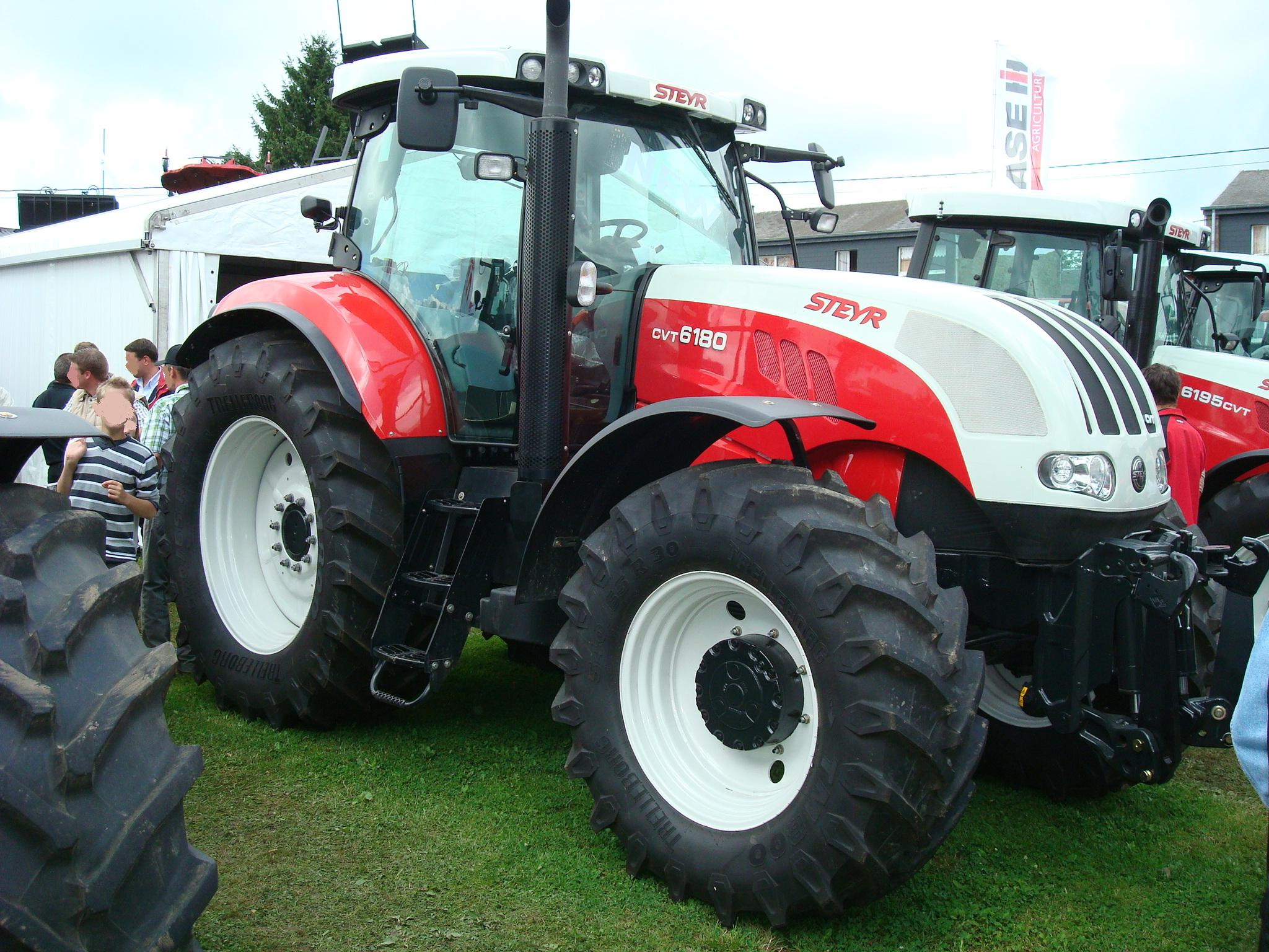 Steyr CVT 6180